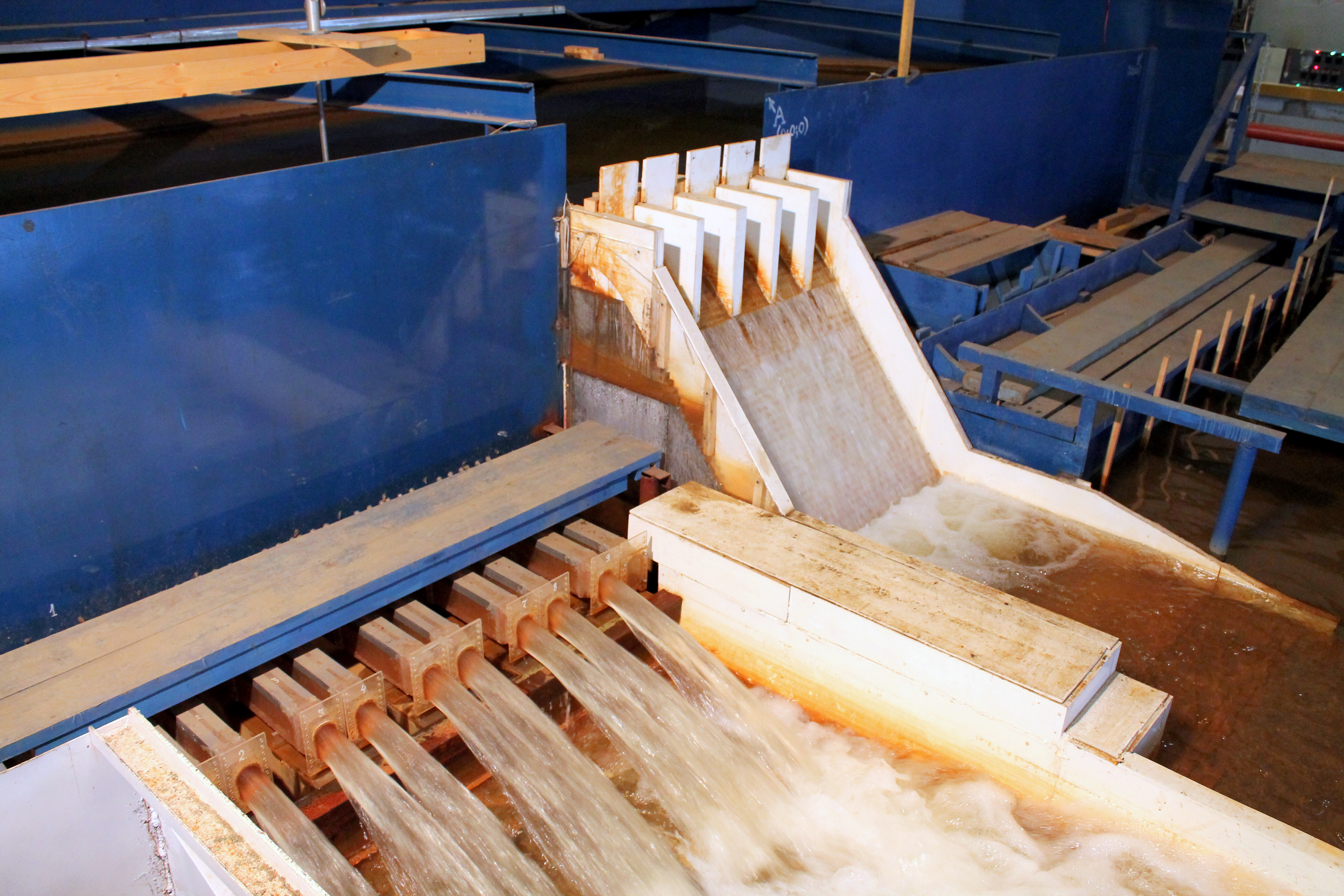 Испытания гидравлической модели водосбросов Богучанской ГЭС во ВНИИГ им.Б.Е.Веденеева